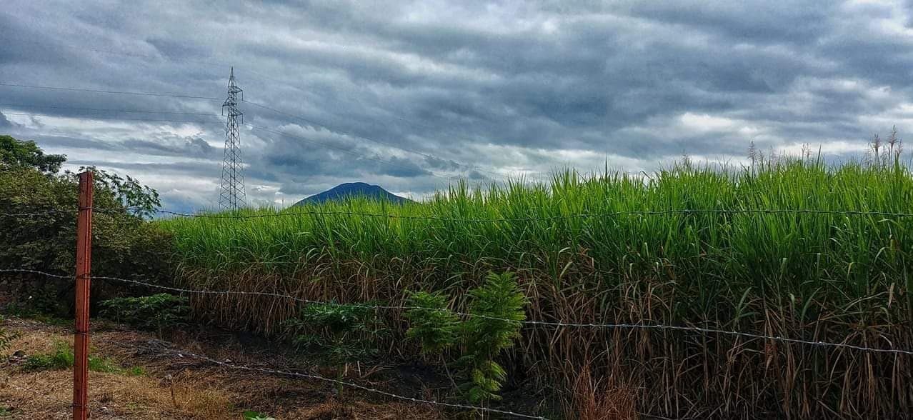 Vista del cerro de nombre Higueron o el cerro del "Xoxotzin" en lengua náhuatl, o el cerro del verdecito en el campo; uno de los elementos naturales más representativos del municipio mexicano de Jojutla, visto desde la carretera del Tescal.